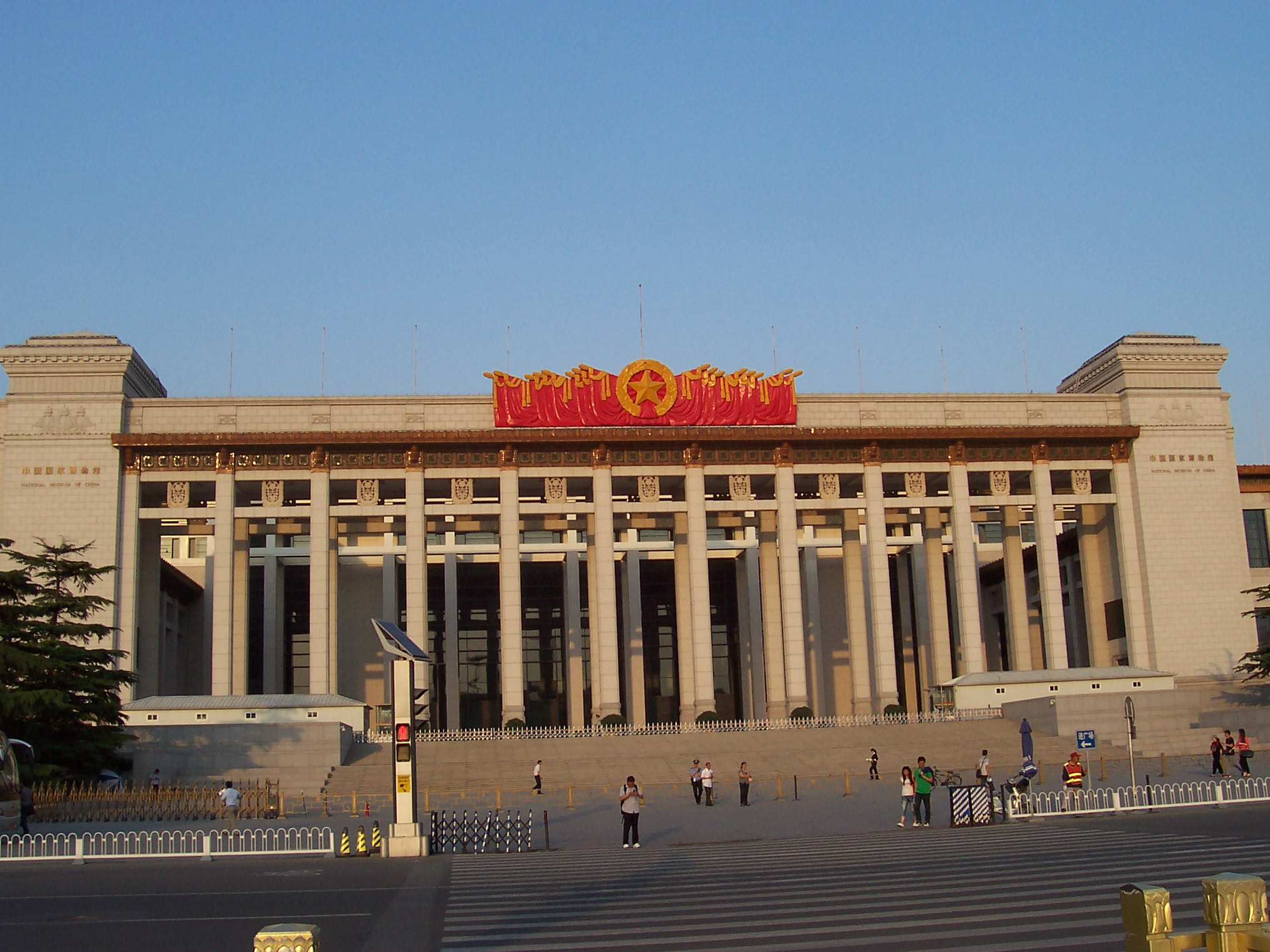 中国国家博物馆